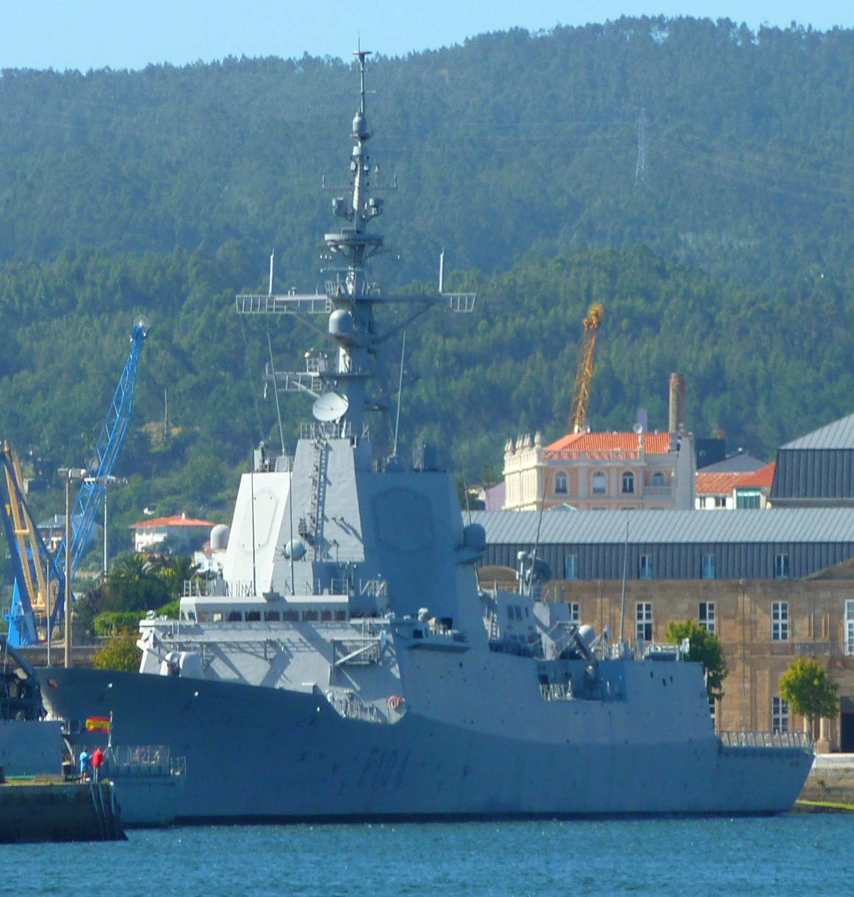 Fragata de la Armada Española clase Álvaro de Bazán "Méndez Núñez".